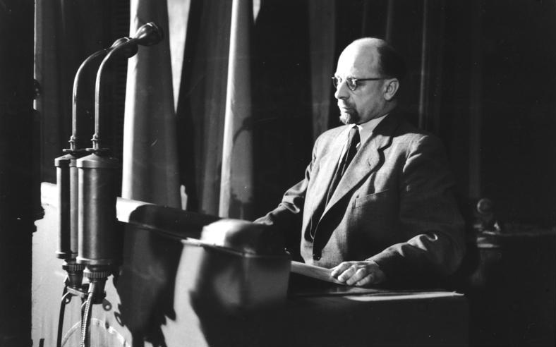 ADN-ZB-Illus 25.9.1947 2. Parteitag der Sozialistischen Einheitspartei Deutschland in Berlin vom 20. bis 24.9.1947 Walter Ulbricht während seines Referates.